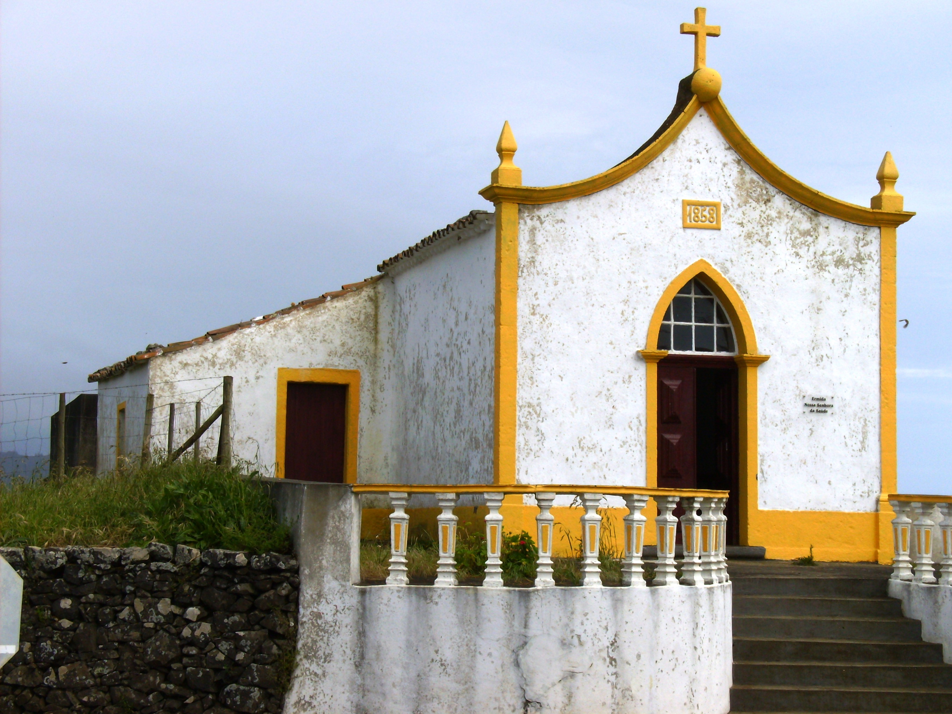 Ermida de Nossa Senhora da Saúde, Ilha de Santa Maria (Açores), Portugal.